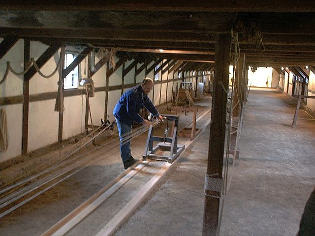 Blick in eine Seilerei, eigenes Bild, GFDL